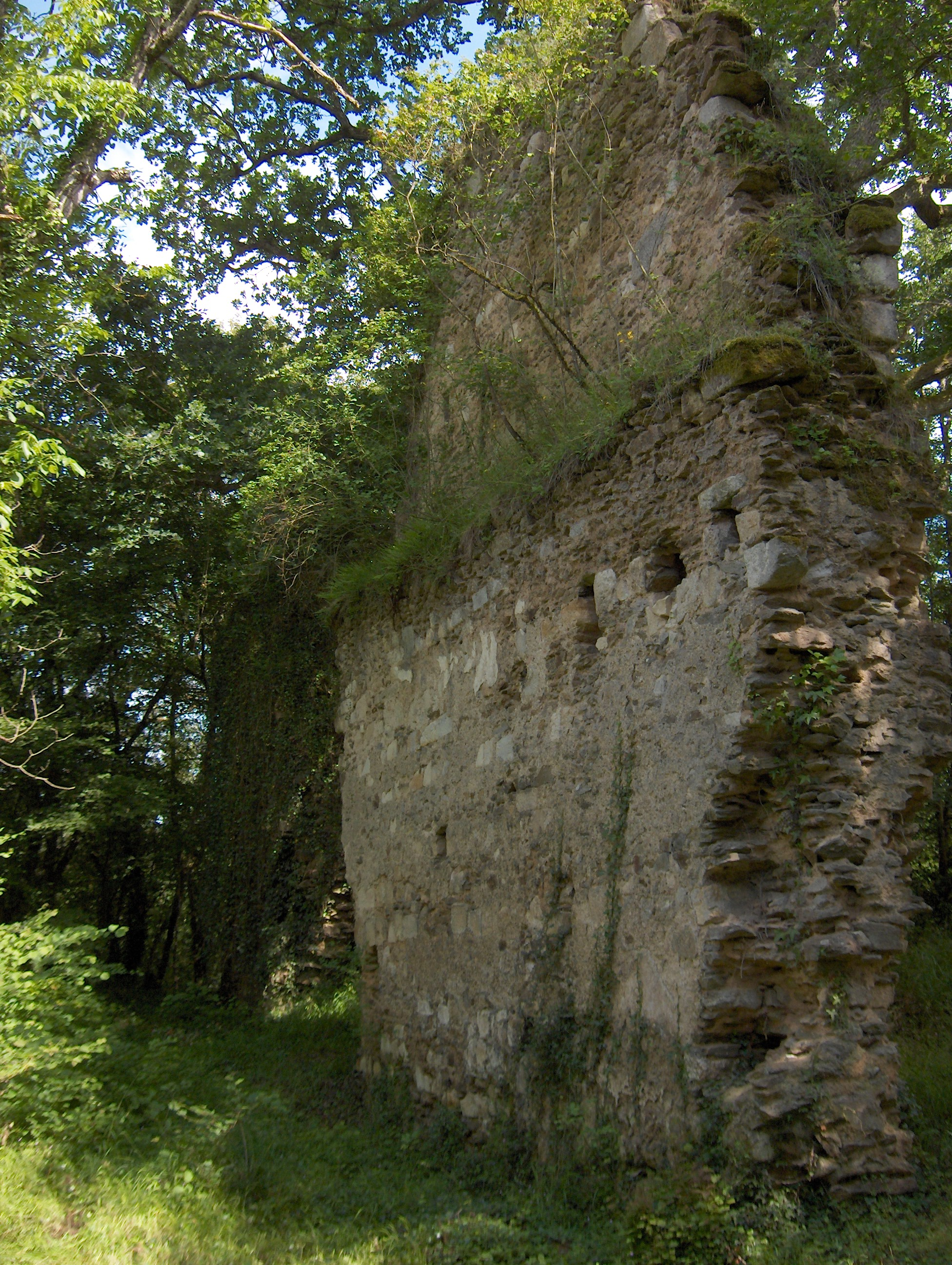 Vue de l'église vers l'est, vestiges du mur sud, mitoyen au cloître.